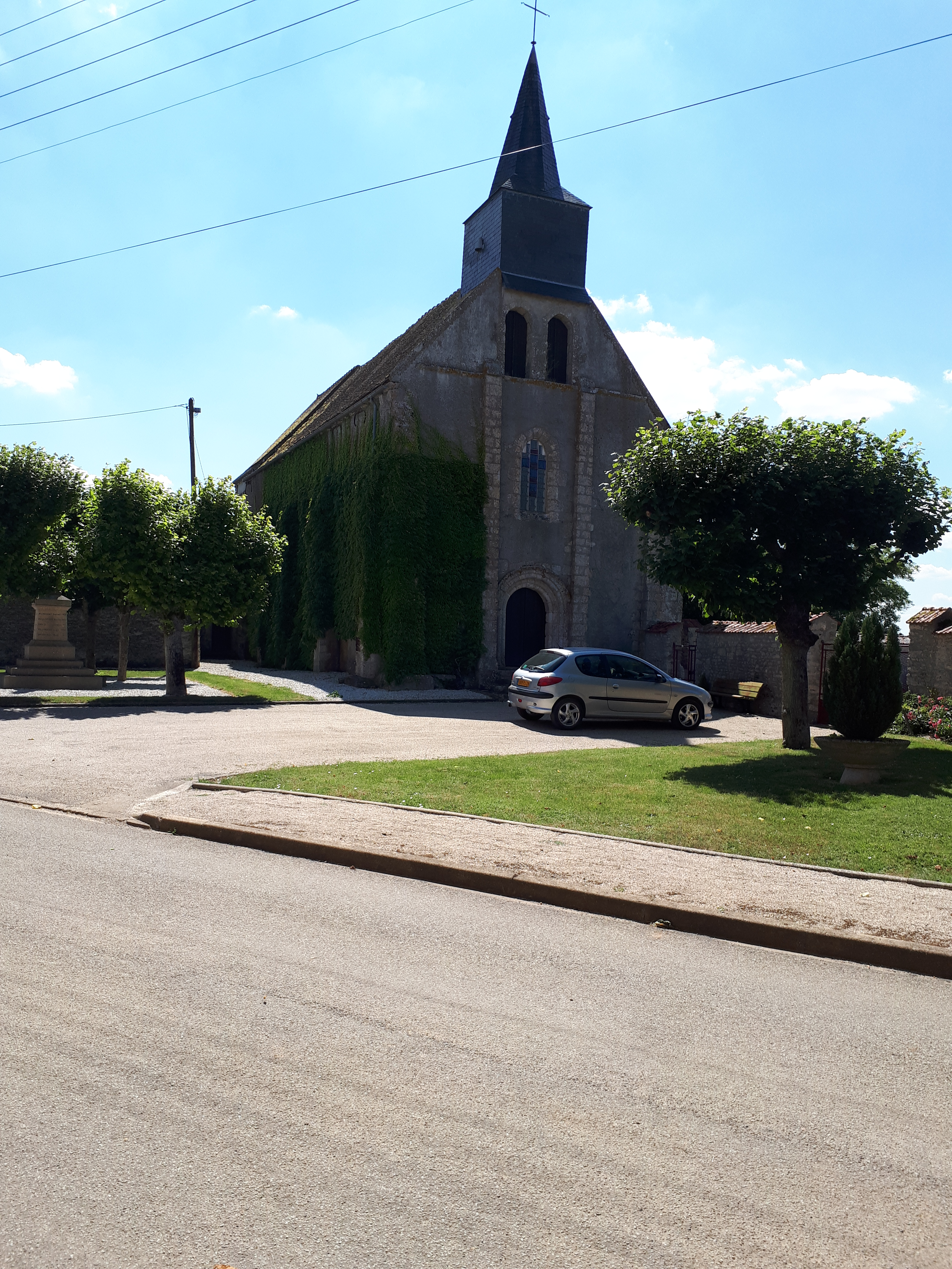 Église de Vierville (Eure-et-Loir).